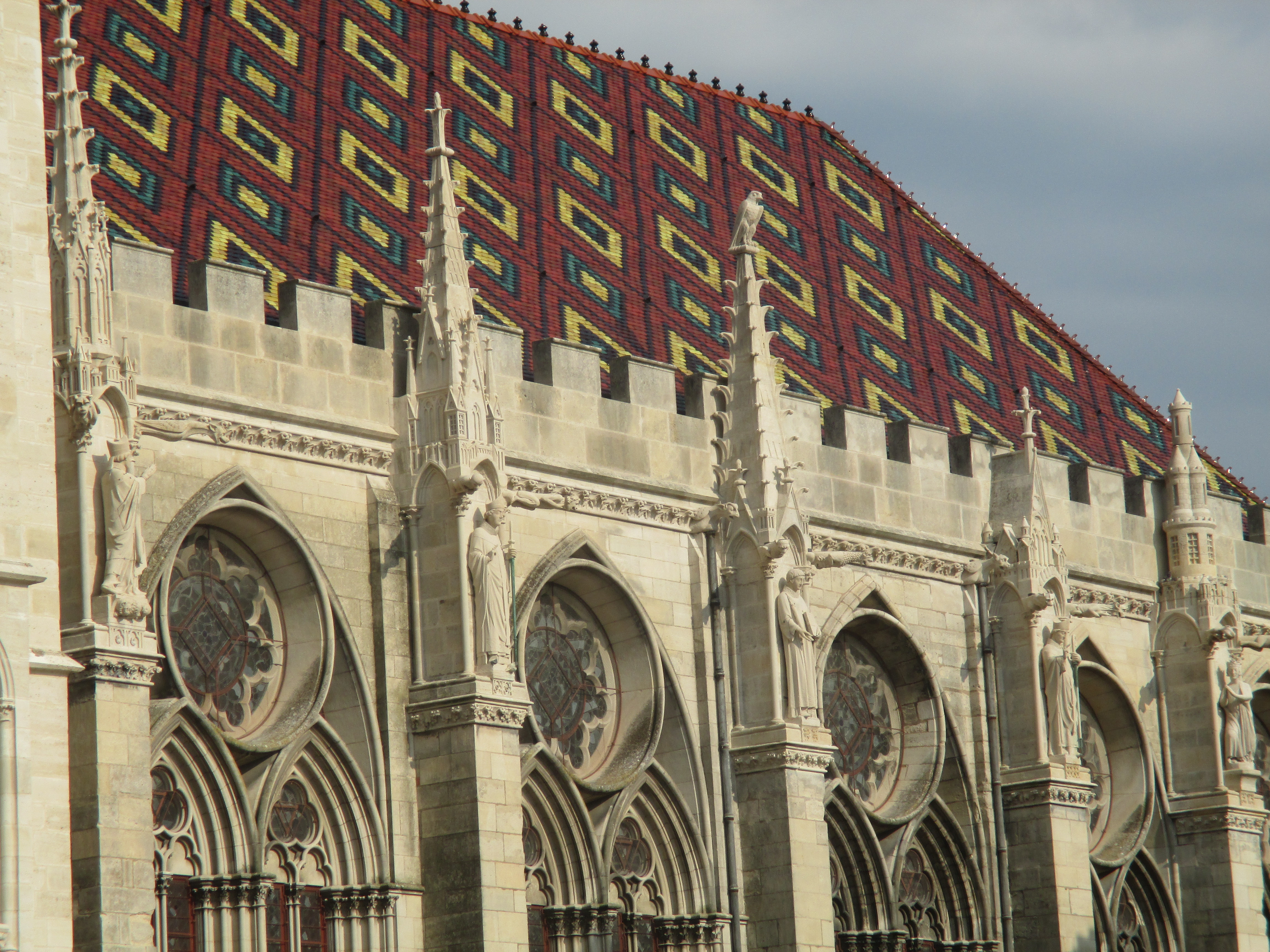 Toit de la salle synodale de Sens.